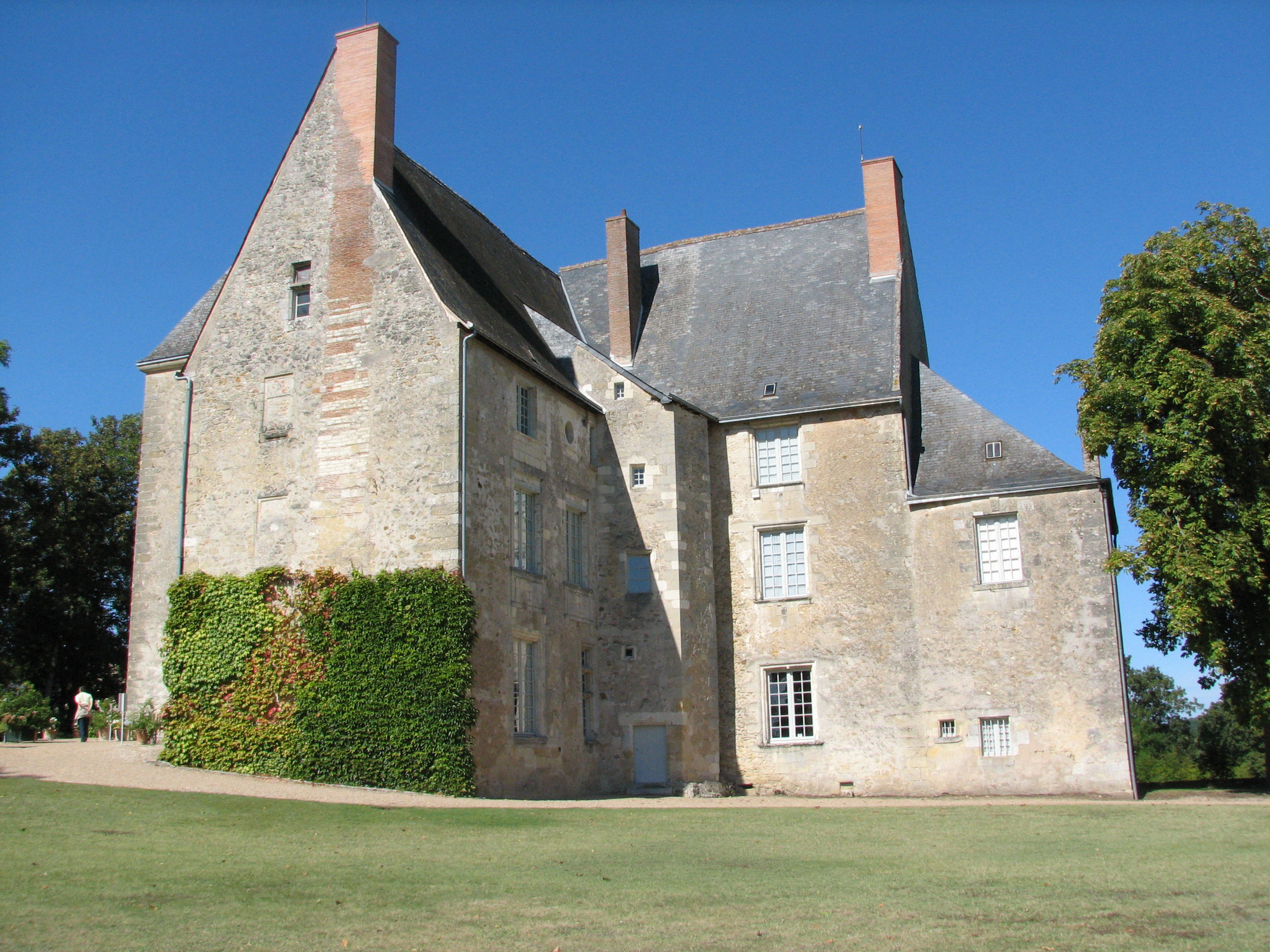 Maison de Honoré de Balzac à Saché (Indre-et-Loire).